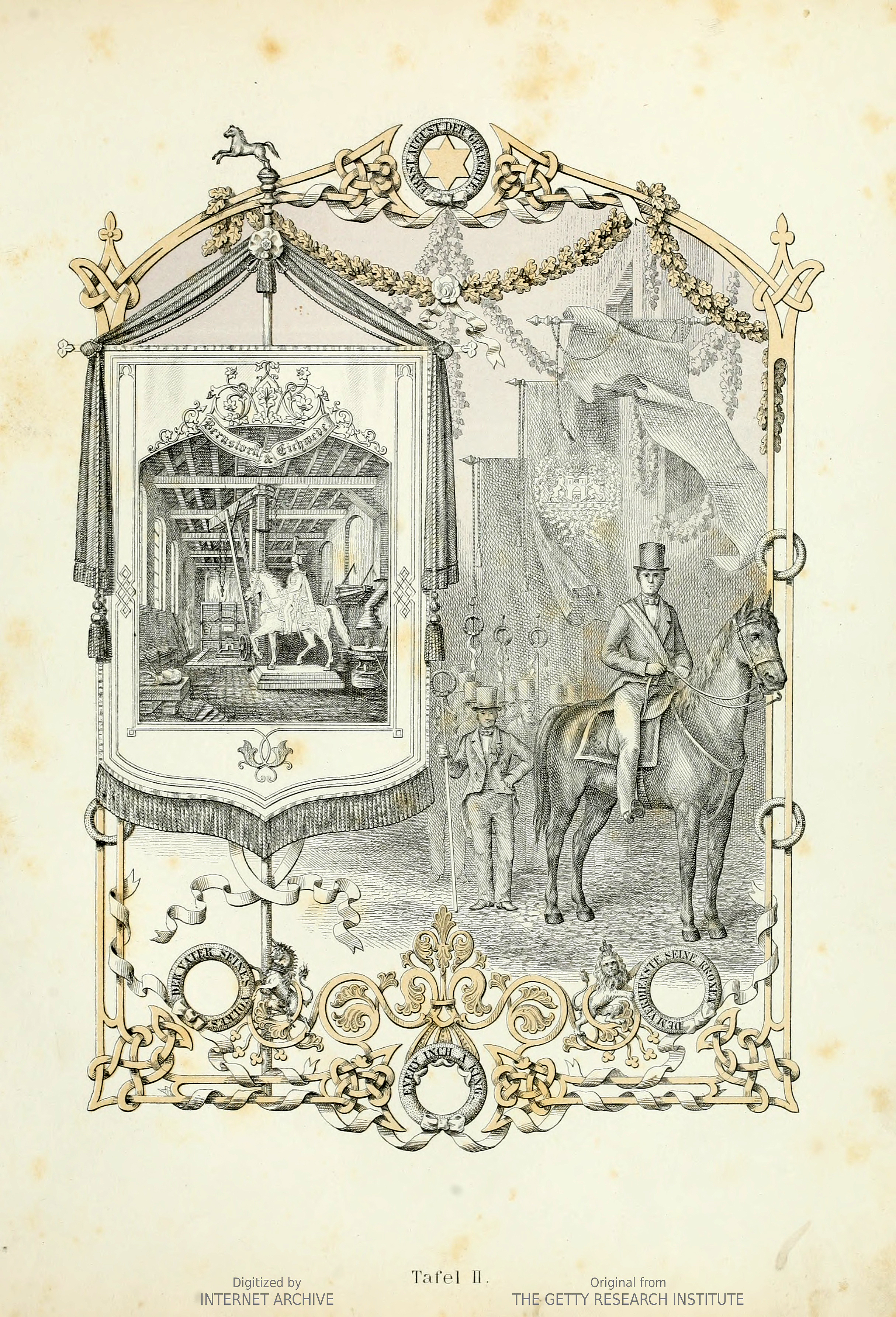 Seite aus dem Ernst August Album ...